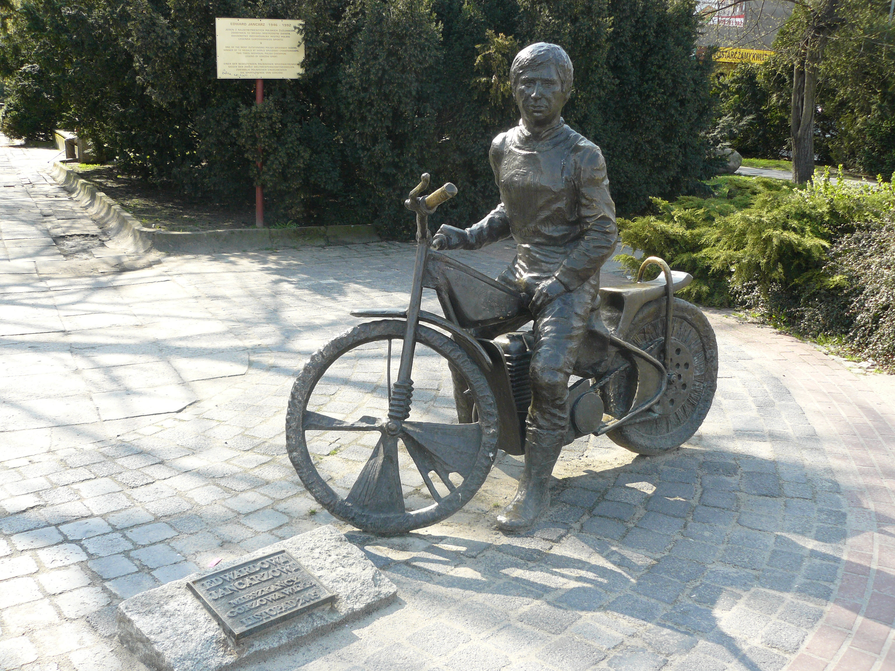 Posąg Edwarda Jancarza w Gorzowie Wielkopolskim.